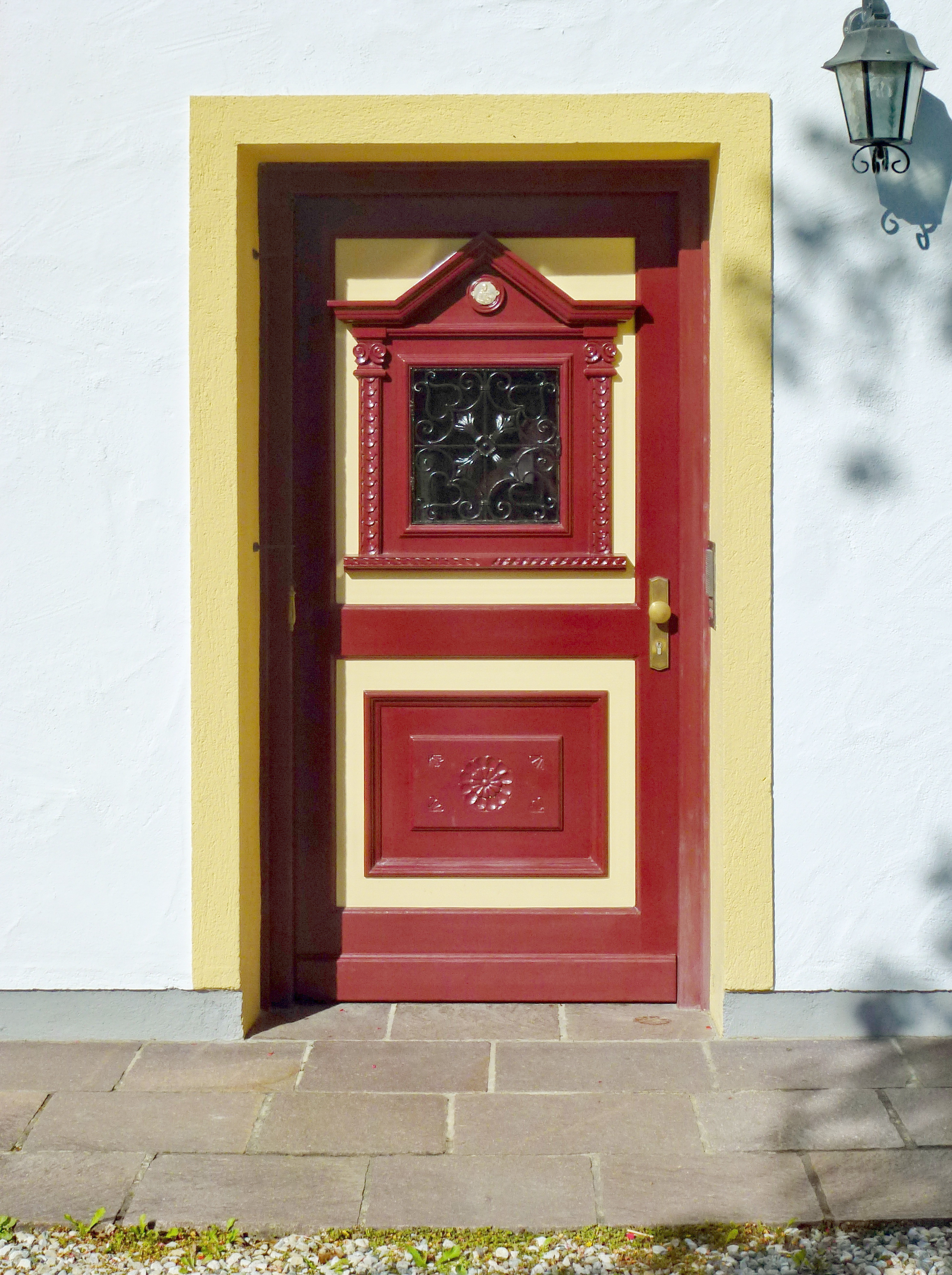 Sulzemoos, Kirchstr.5: Ehemaliges Pfarrhaus. Detail: Hölzerne Eingangstür mit Glasfenster und schmiedeeisernem Gitter